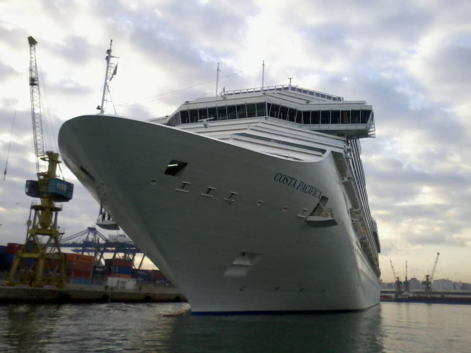 Proue du croisiére COSTA PACIFICA en quai . Casablanca - Morocco - IMO: 9378498 Pavillon: Italy Genre du navire: Passenger Année de Construction: 2009